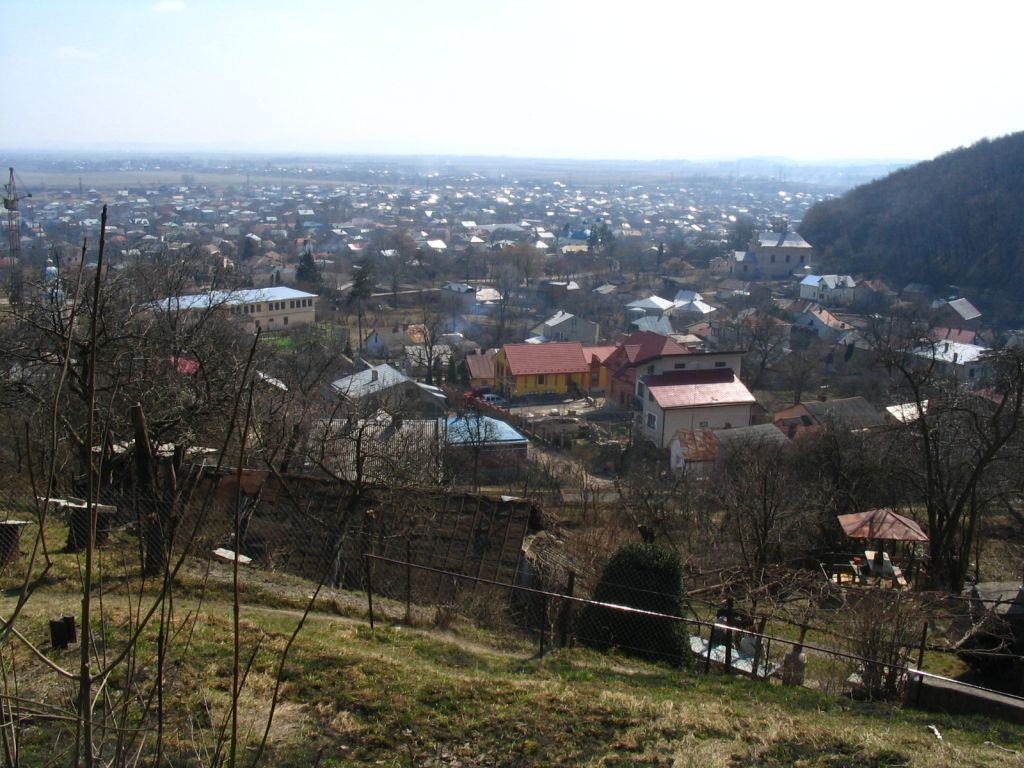 Город Винники с Западной стороны